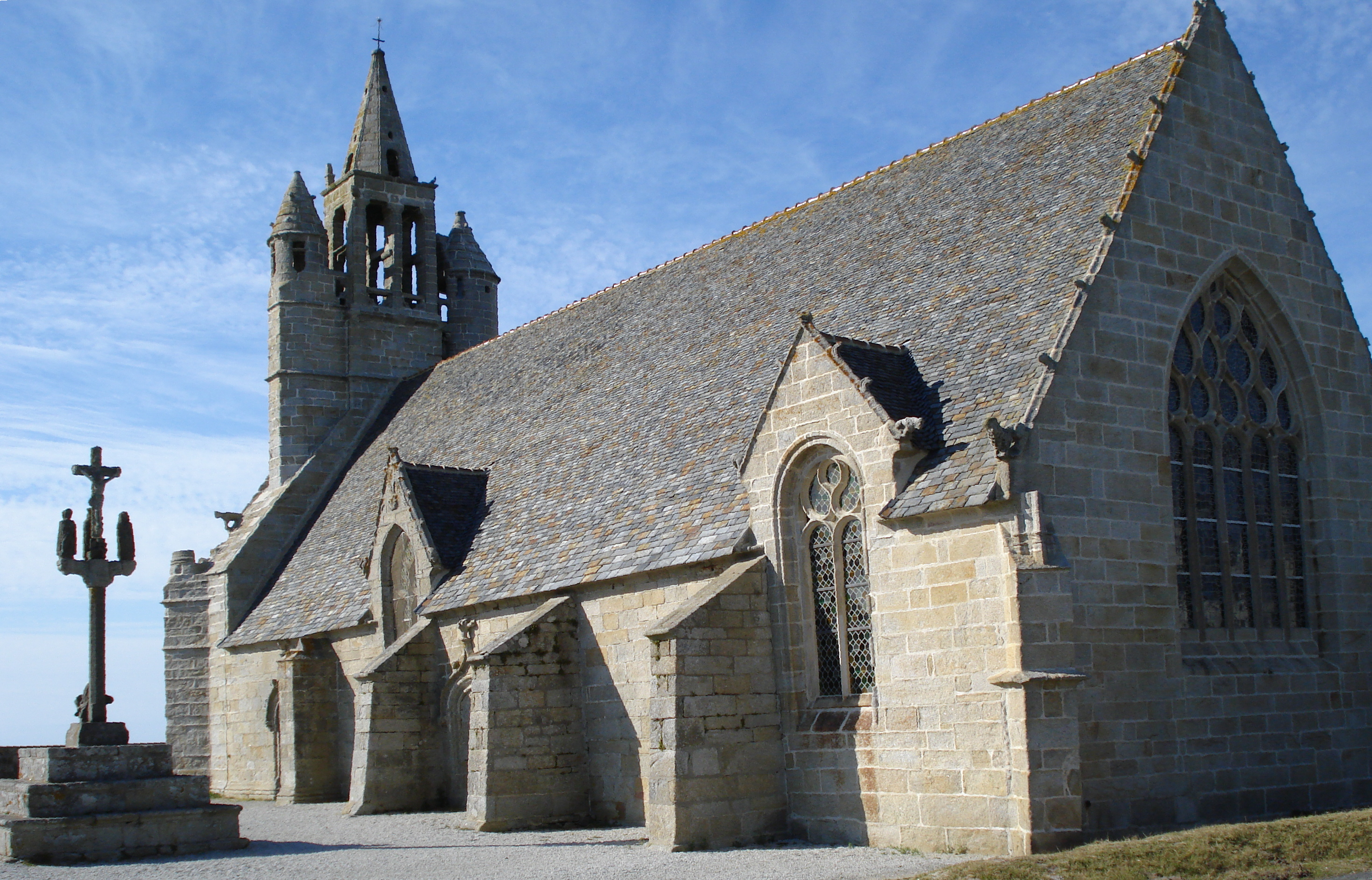 Chapelle Notre-Dame-de-la-Joie, St.Guénolé, Commune de Penmarc'h,Finistère, bretagne, France.